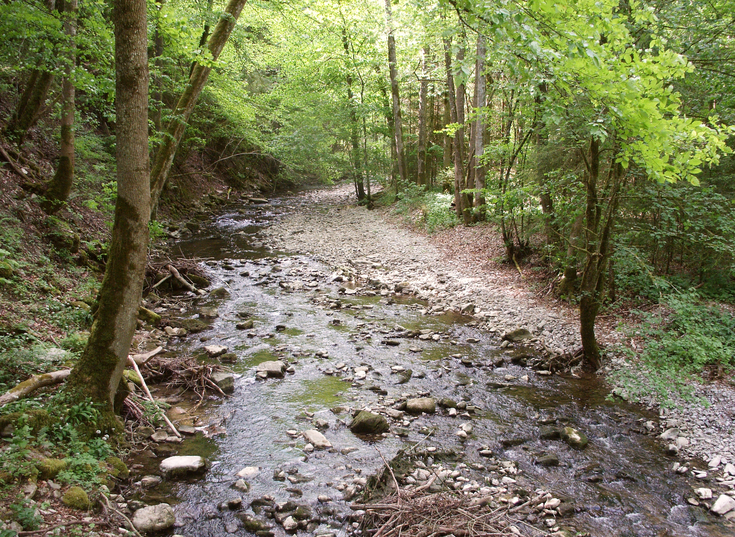 Schmerach near Unteraspach, Ilshofen, Germany